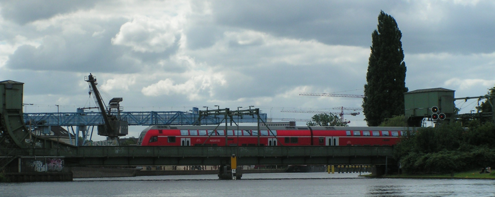 Eisenbahn-Klappbrücke über die Hunte in Oldenburg